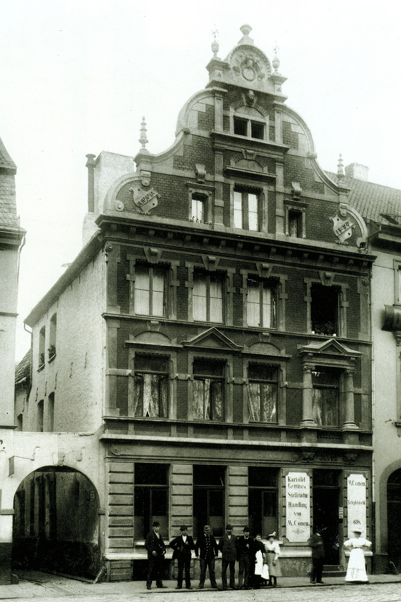 t